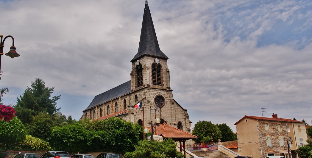 église Sacré-Cœur